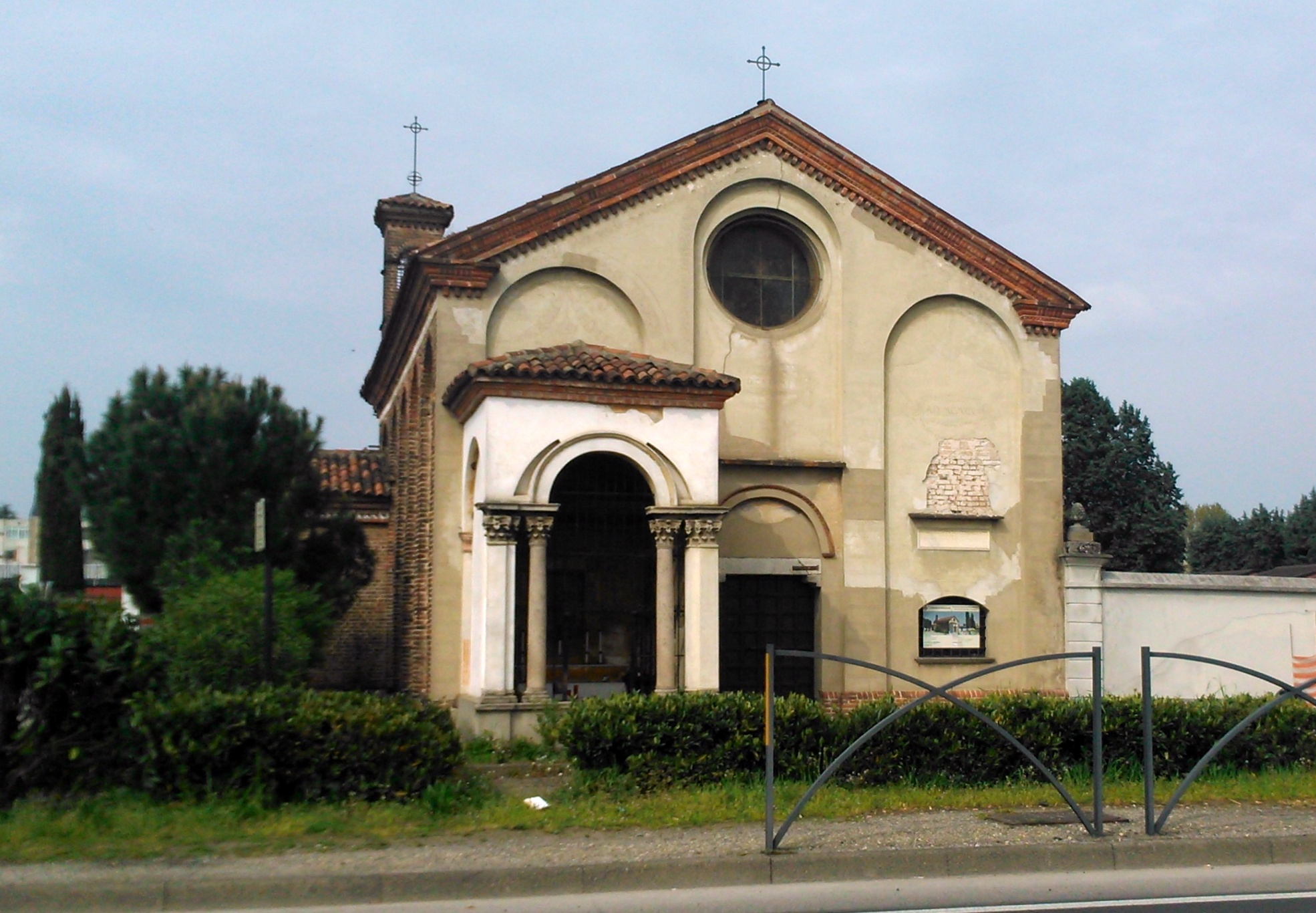 Chiesa Santa Maria Nova - detta anche "del pilastrello", situata a Vimodrone (Milano), sulla Strada statale 11 Padana Superiore